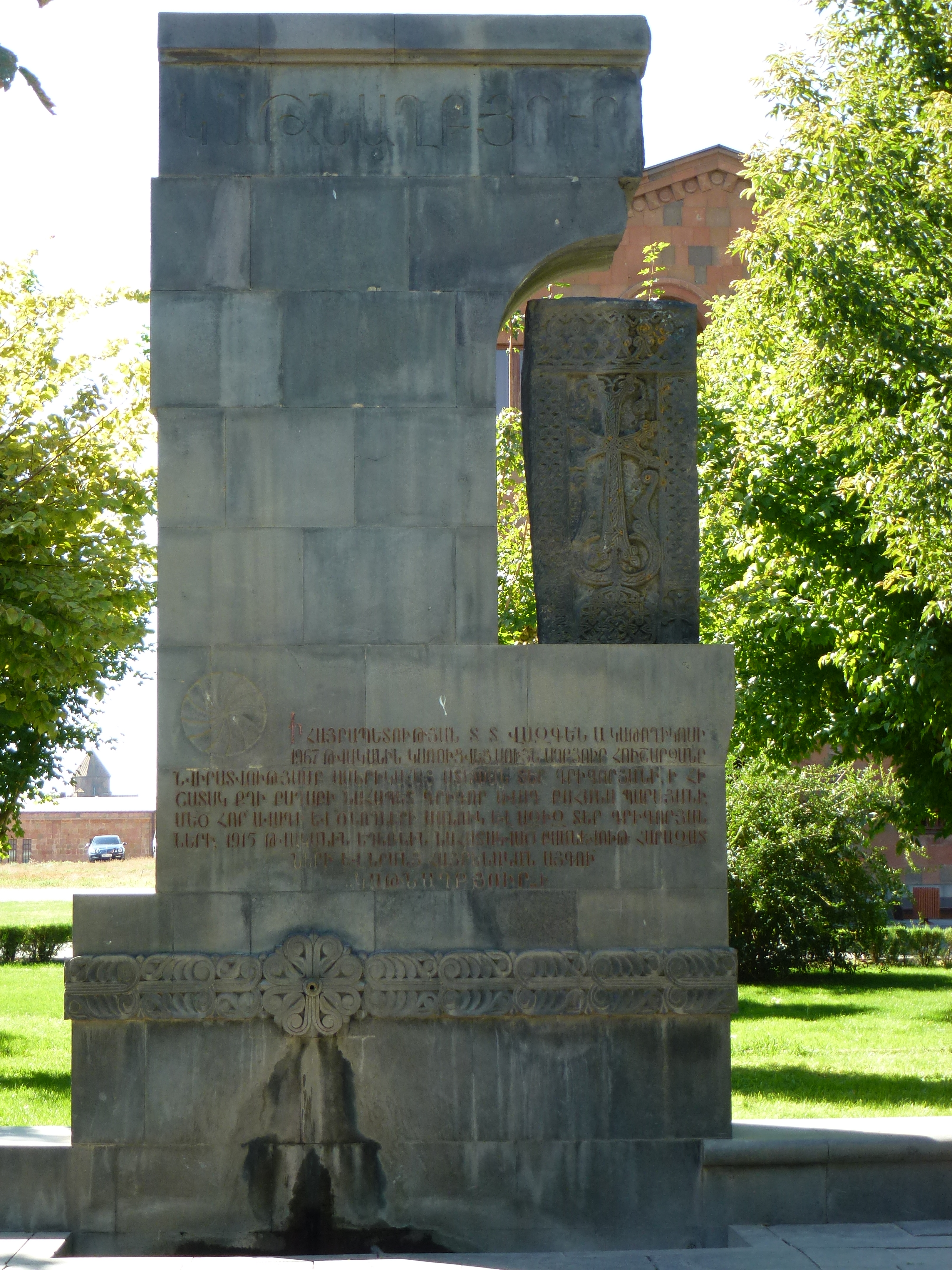 Հուշակոթող Էջմիածնի Մայր տաճարի բակում 2/14.1.39